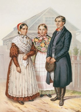 Беларуская (тарашкевіца): Нямецкія каляністы ў Расейскай імпэрыі.